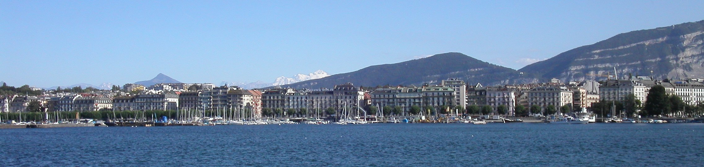 *Genève, la rade, Le Môle, le mont Blanc auteur : utilisateur:Marc Mongenet date : 13 septembre 2004 licence